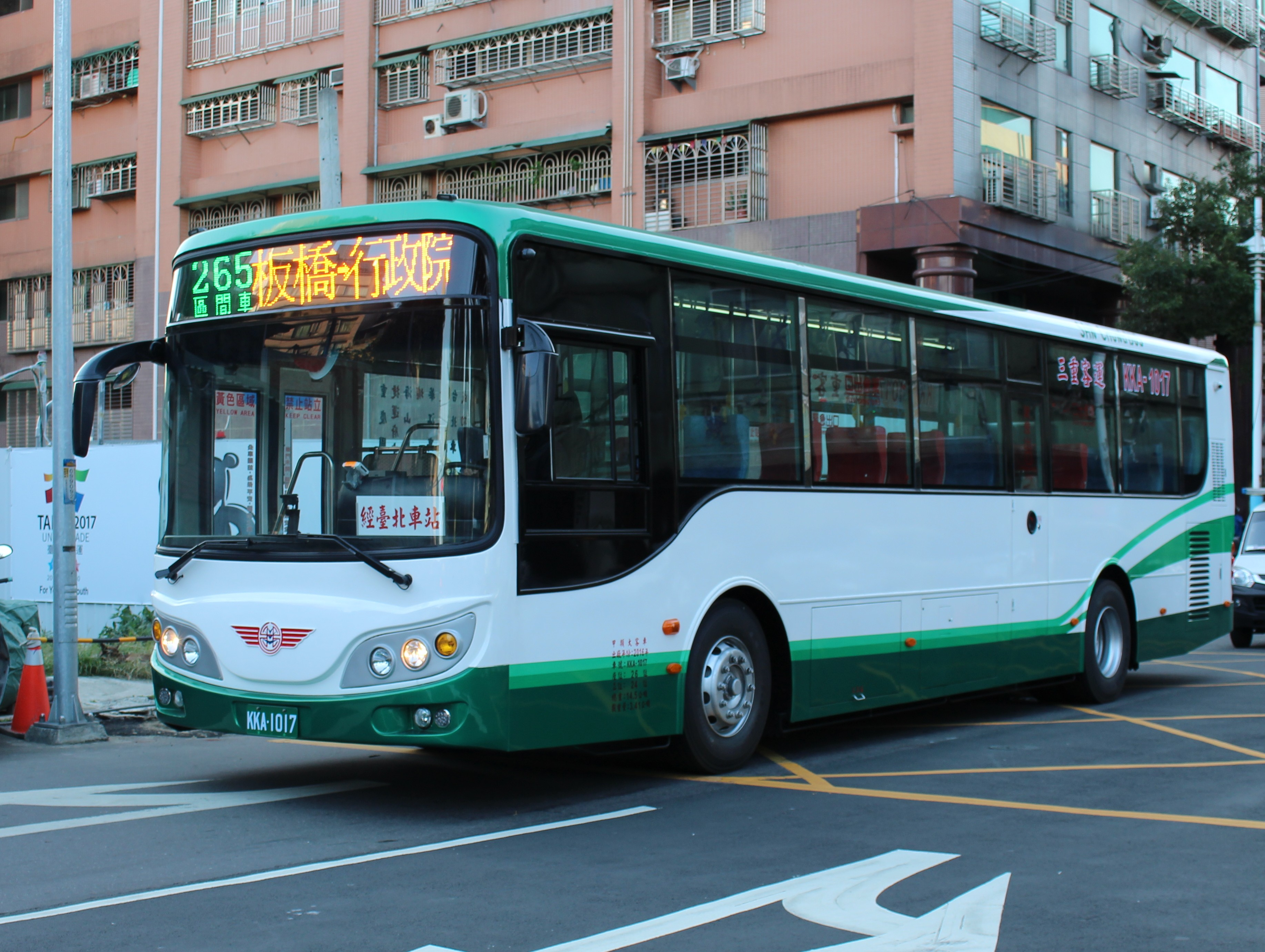 三重客運2016年HINO RK8JRVA-KJF雙門大客車KKA-1017